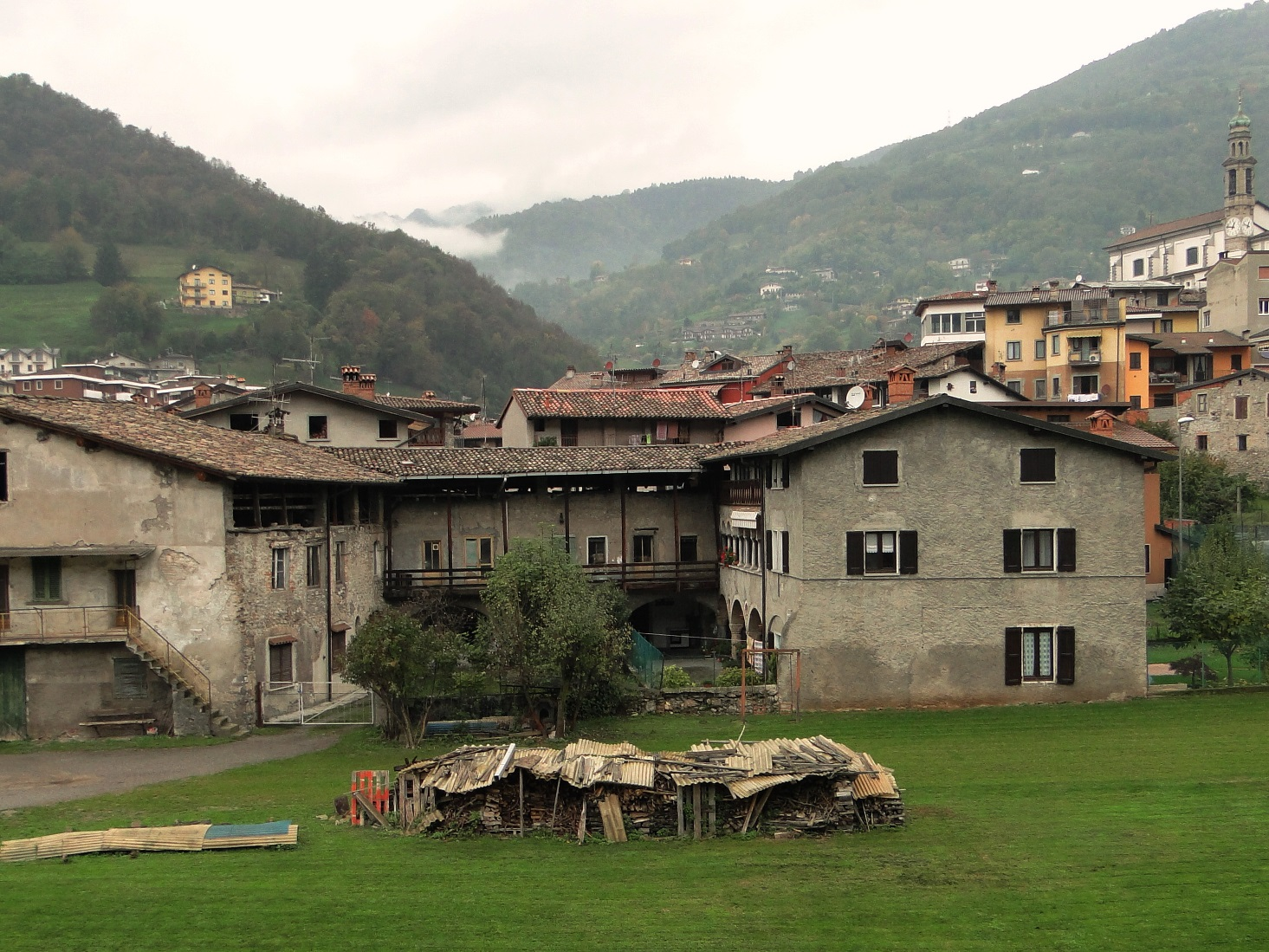 Casa della Soppressa, sec.XV. Vertova (BG). Italia